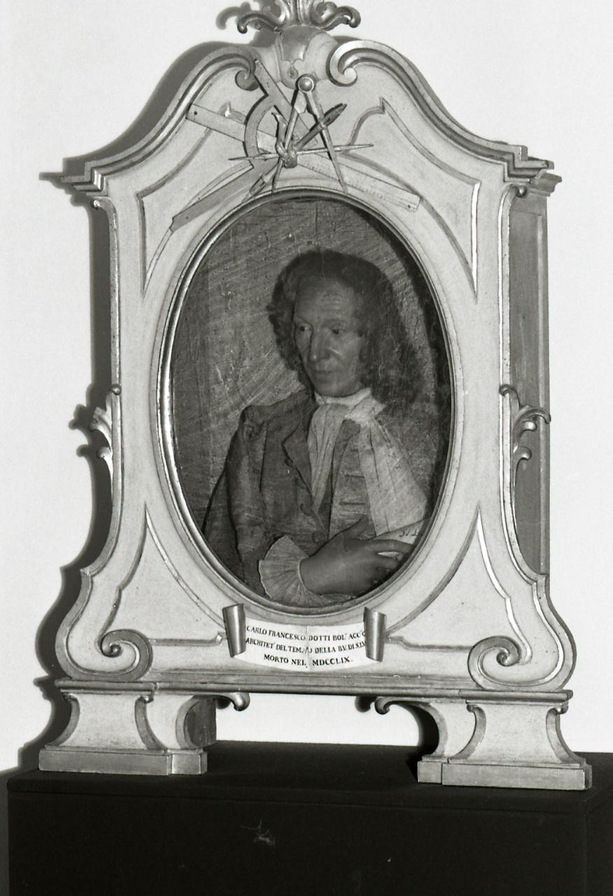 Wax portrait of Carlo Francesco Dotti, attributed to Angelo Gabriello Piò